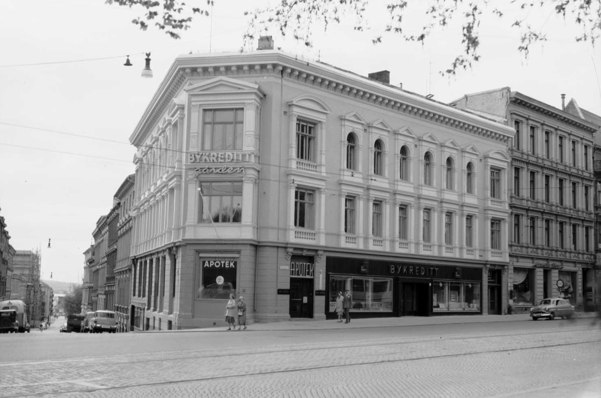 Huitfeldts gate 1, på hjørnet av Drammensveien. Senere omregulert til Drammensveien 10 og i dag Henrik Ibsens gate 36.